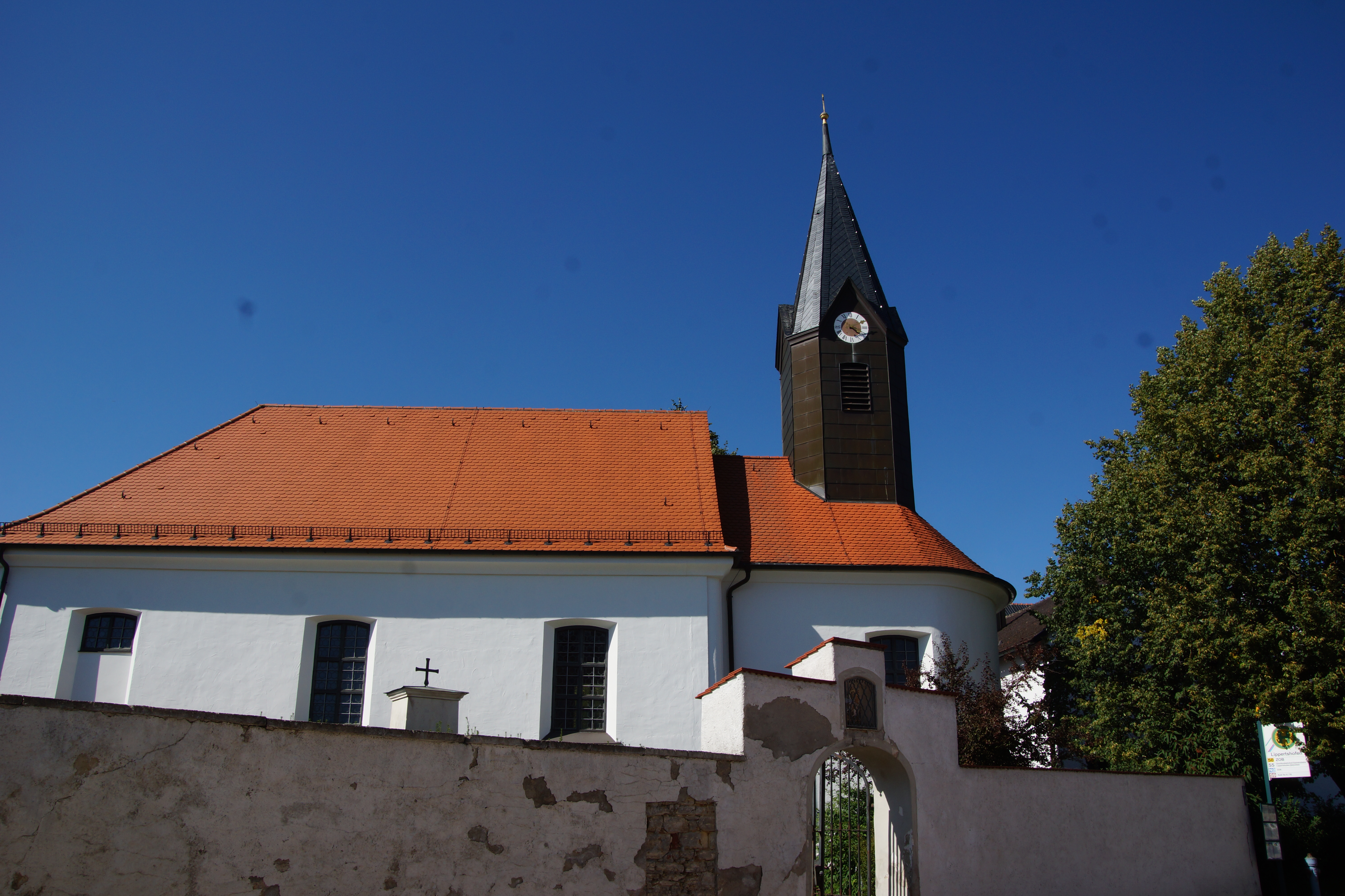 St. Georg und Leonhard - Lippertshofen bei Ingostadt